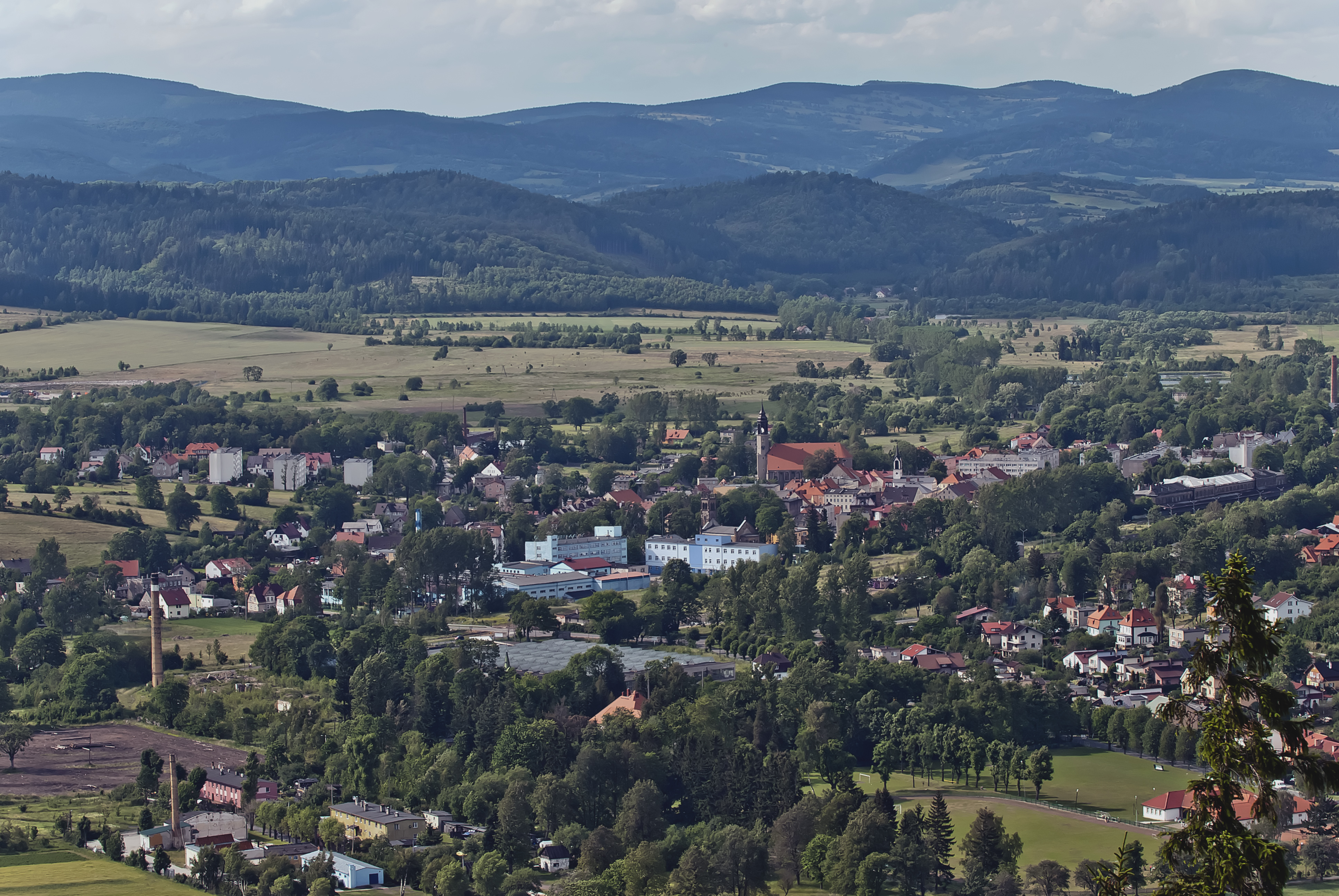 Lubawka, widok z Kruczej Skały